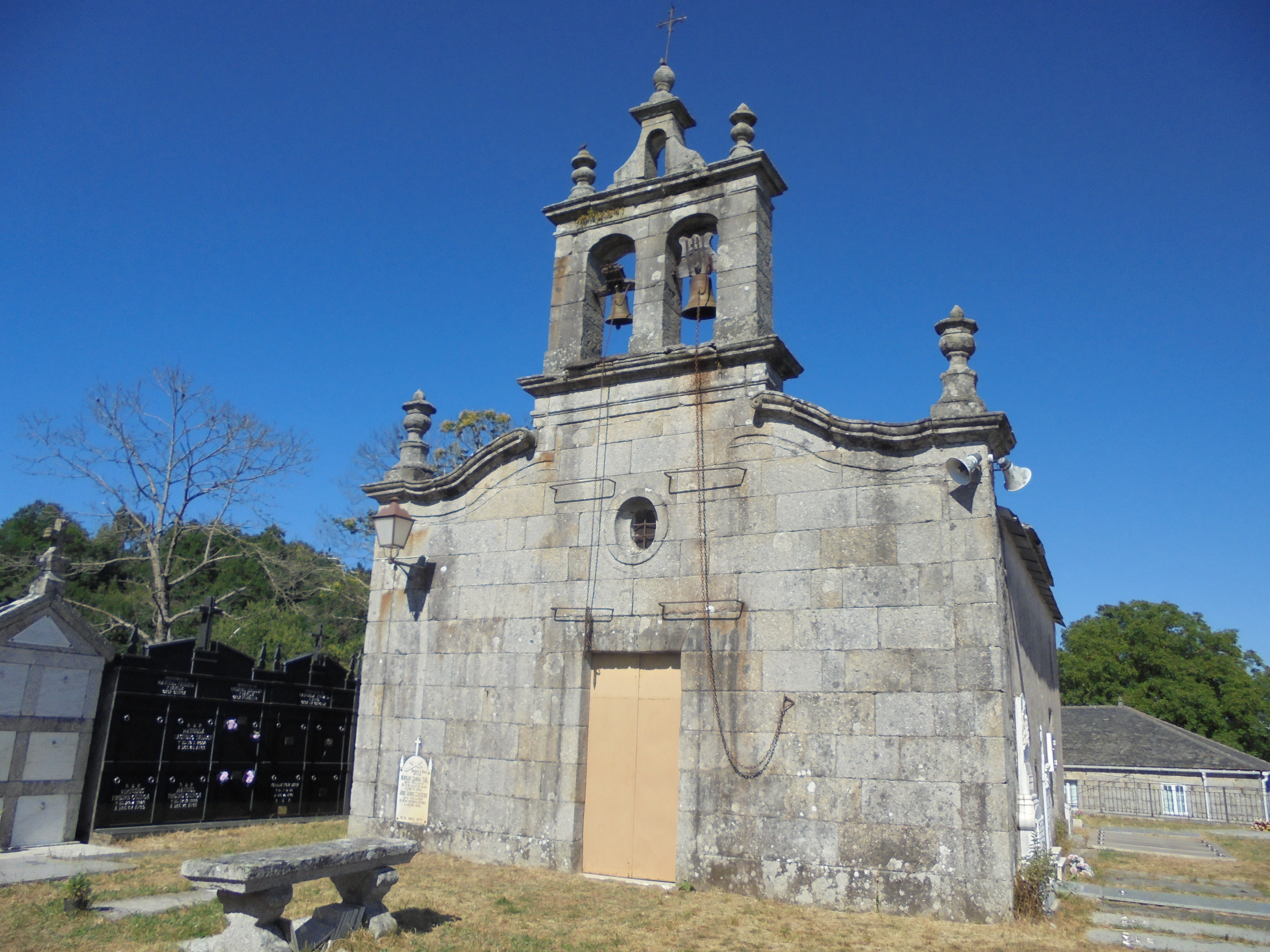 Igrexa parroquial de Gondar ( Lugo)